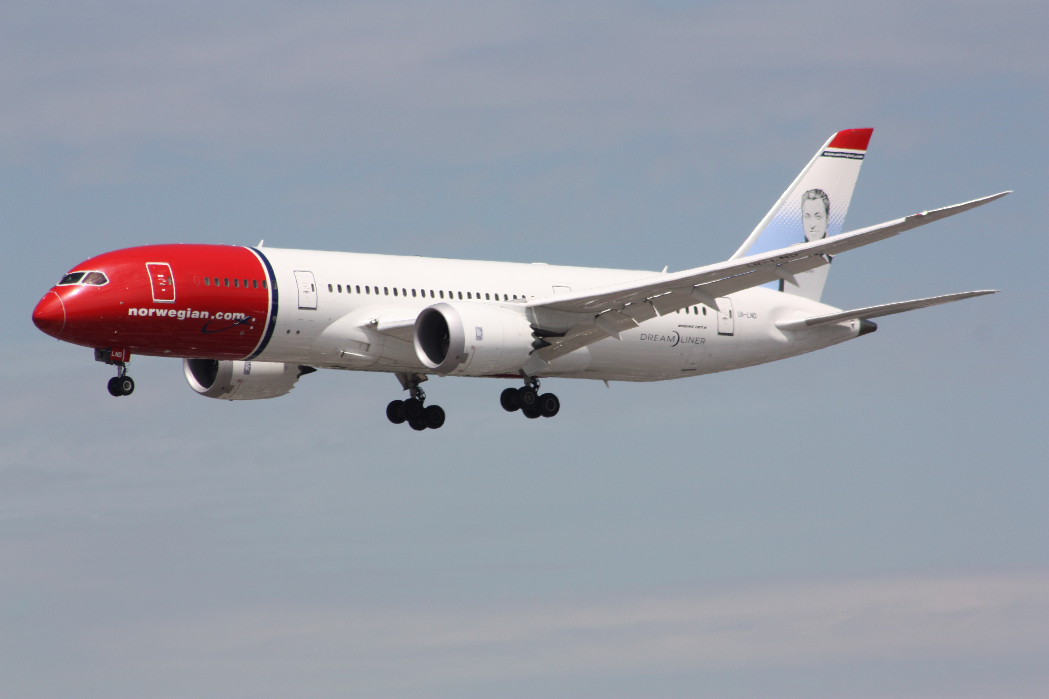 LN-LND